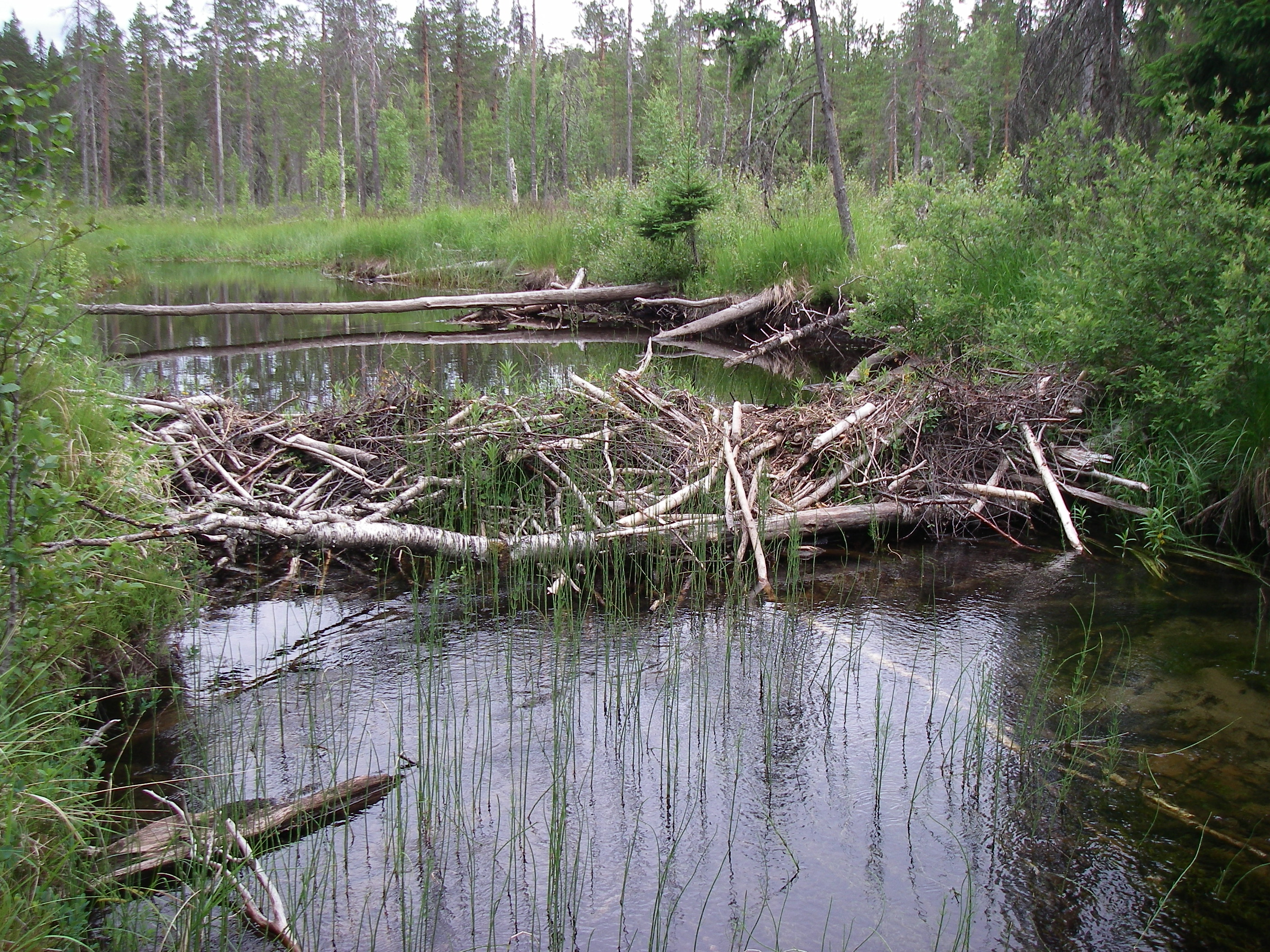 Beaver dam (Castor fiber) From Västernorrland, Sweden.